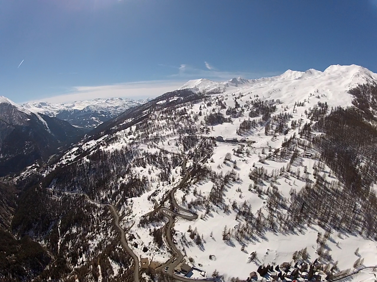 Vue aérienne de la station de Sainte-Anne-la-Condamine avec sa route d'accès